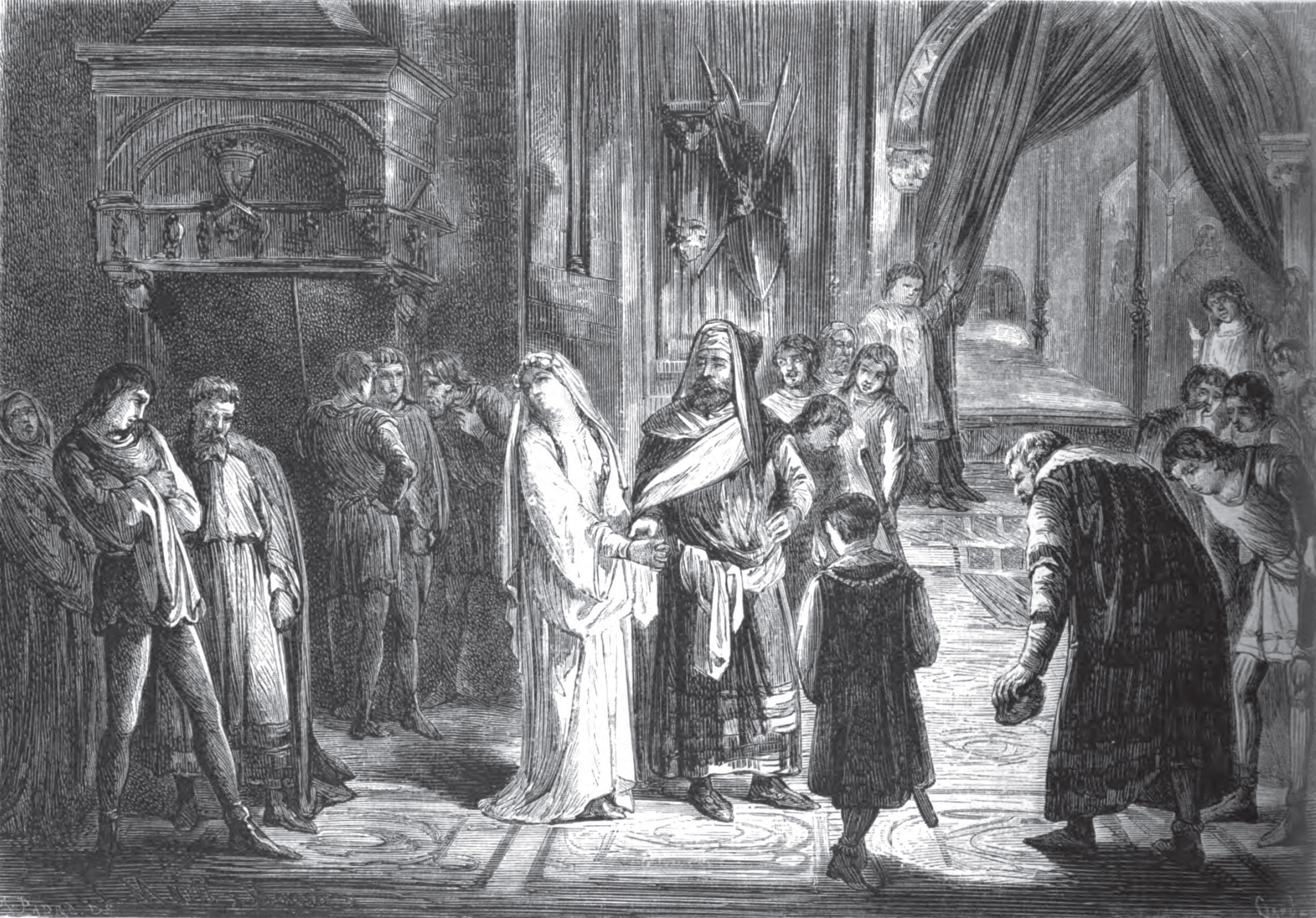 Exposición de Bellas Artes de 1871. El derecho de pernada.